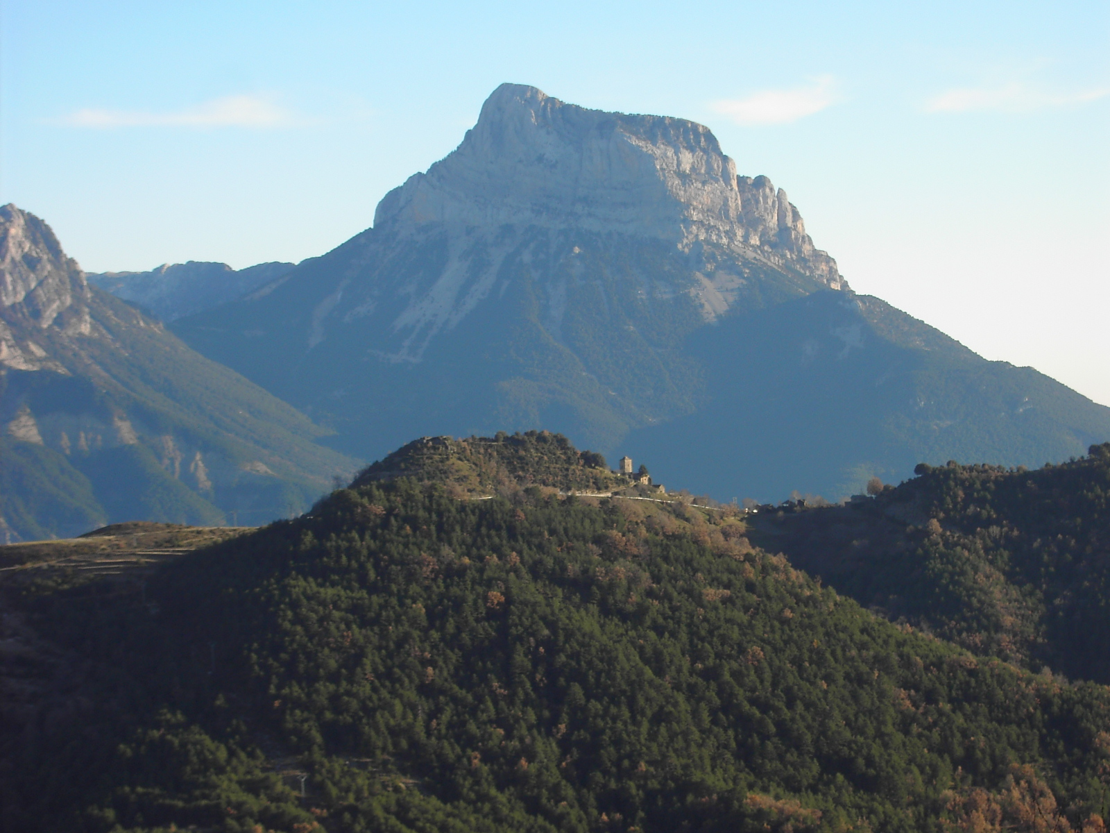 Tozal de Puértolas, en el centro de la imagen, con la Peña Montañesa de fondo.